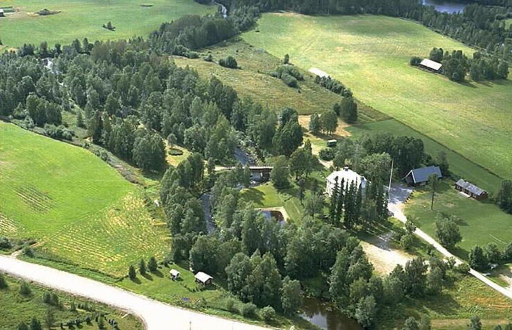 Observera att det är Luleå kommun och att landskapet är Norrbotten. Motiv: Melderstein Nyckelord: Flygbilder, Riksintressen Kategori: Herrgårds-/slottslandskapObservera att det är Luleå kommun och att landskapet är Norrbotten.